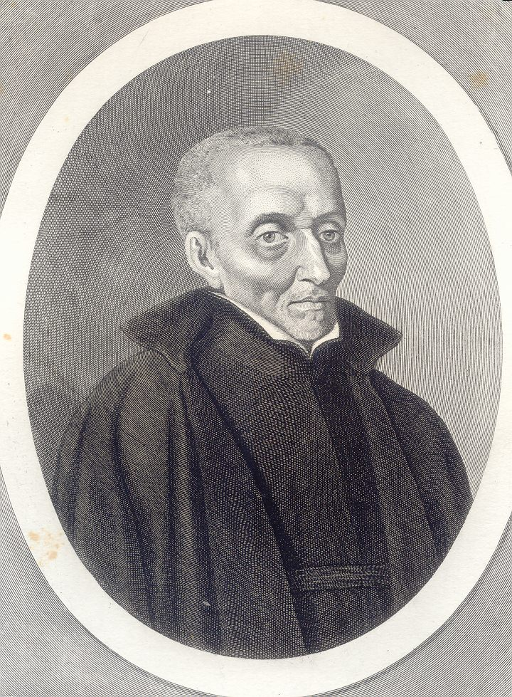 Gravute tirée du livre de HAMY, Alfred: 'Galerie illustrée de la Compagnie de Jésus, Paris, 1893.